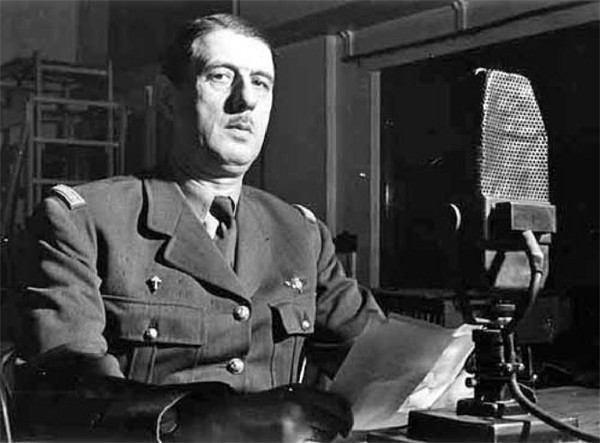 Charles de Gaulle au micro de la BBC à Londres, vers 1940-1943.